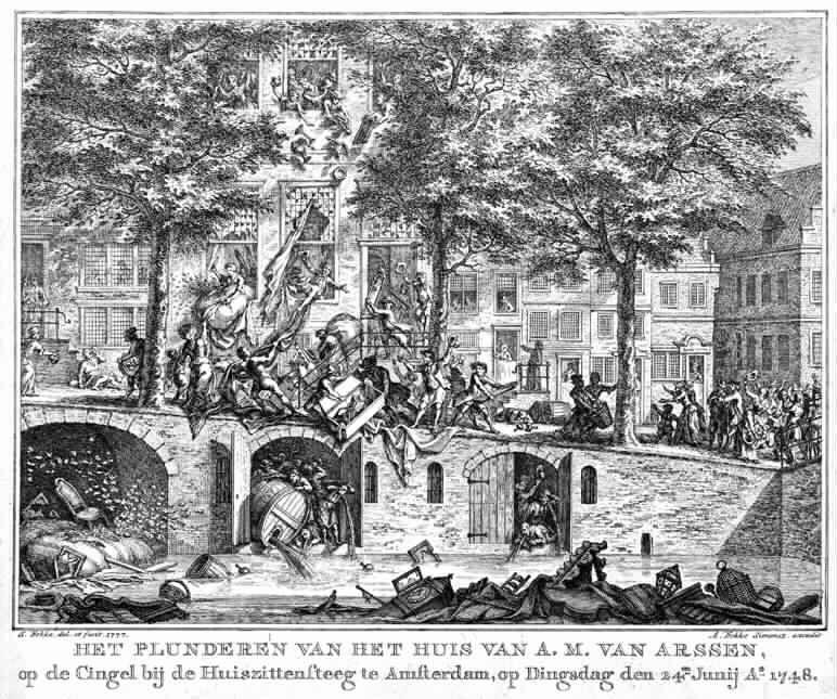 Pachtersoproer, Het plunderen van het huis van A.M. van Arssen, op de Cingel bij de Huiszittensteeg te Amsterdam, op Dingsdag den 24en Junij Ao 1748